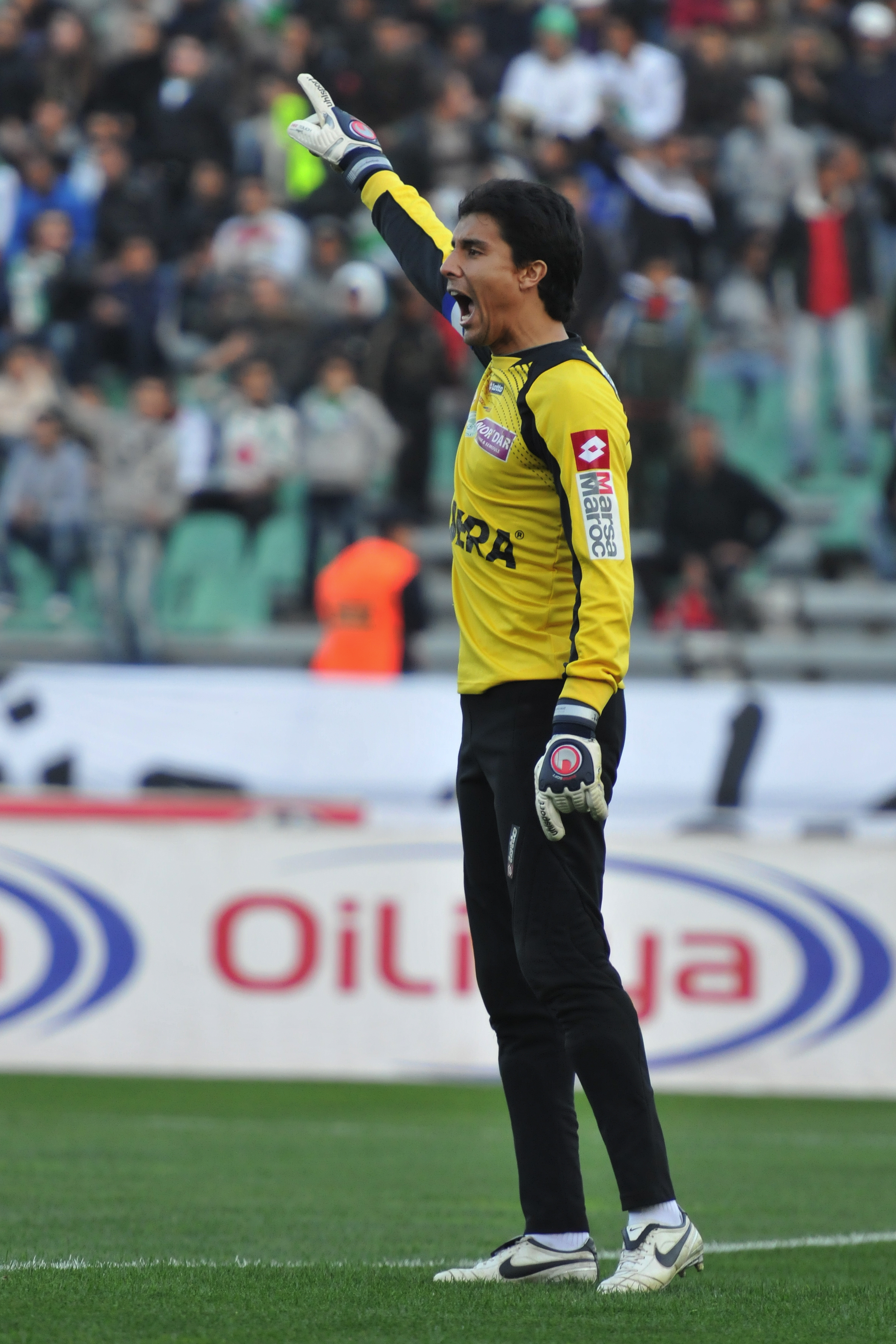 Yassine El Had